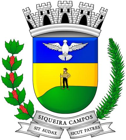 Brasão de Siqueira Campos